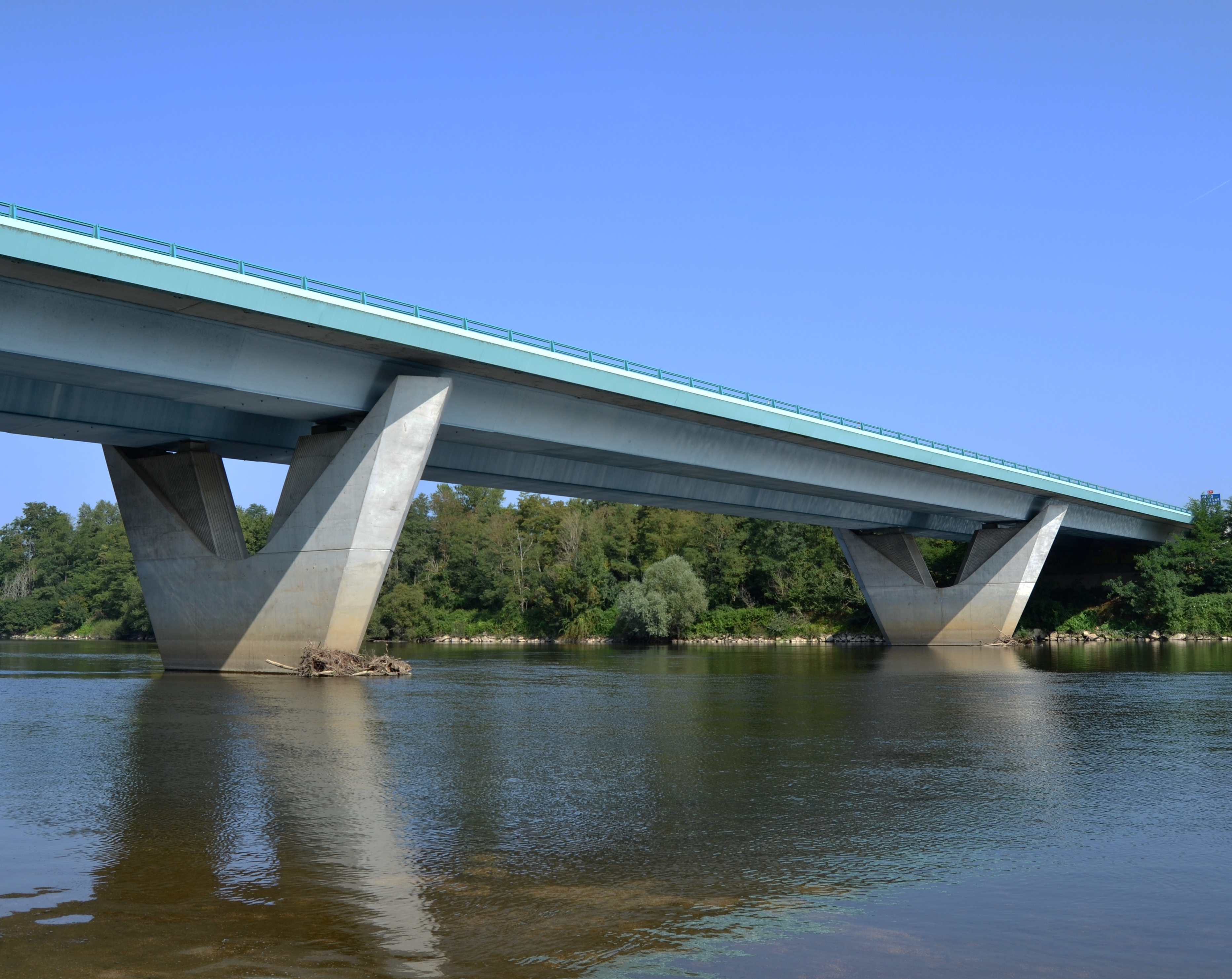 Pont Pierre-Bérégovoy sur l'A77